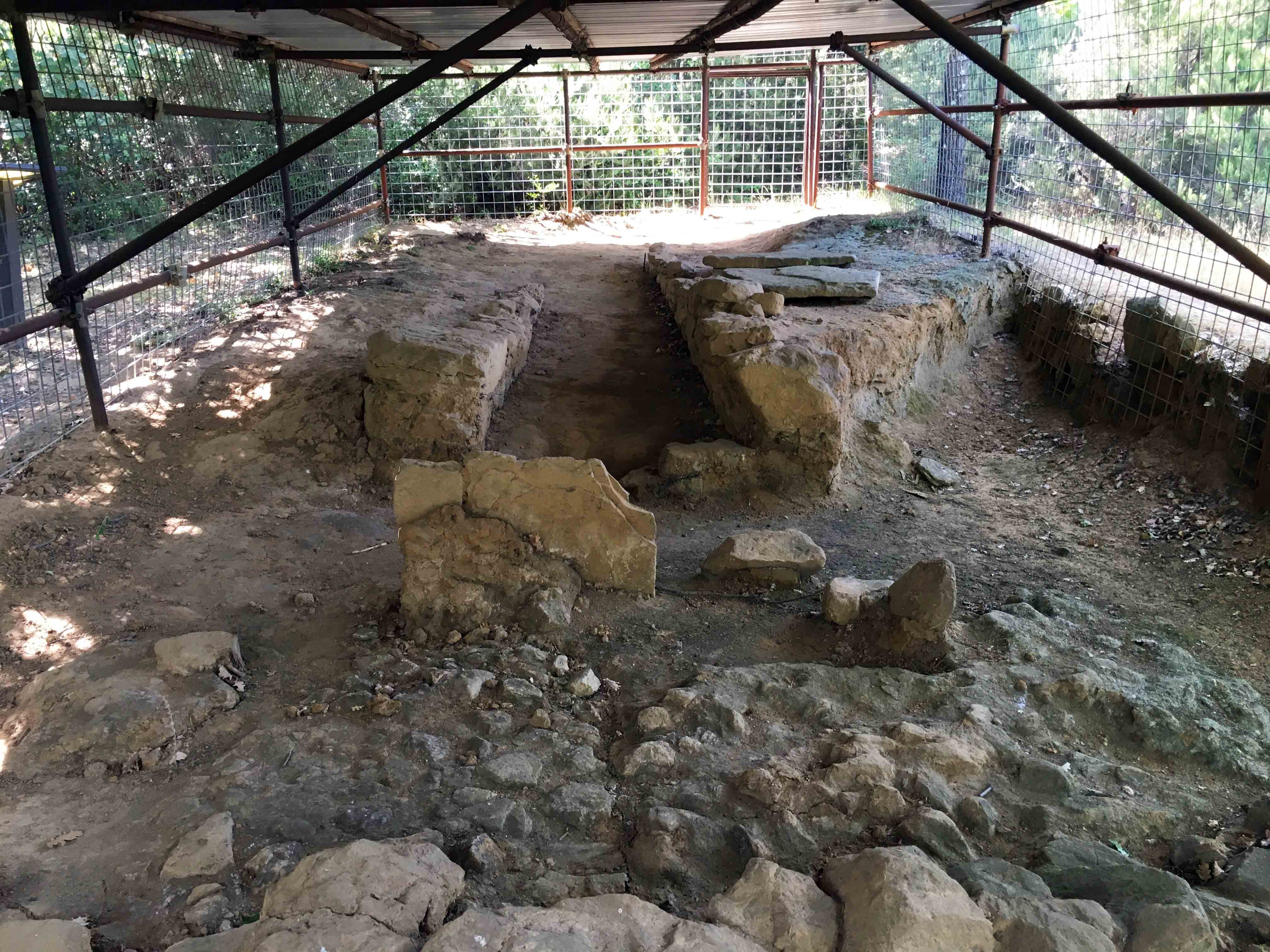 Interno del Tumulo X nella necropoli di Prato Rosello